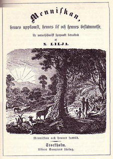 Book